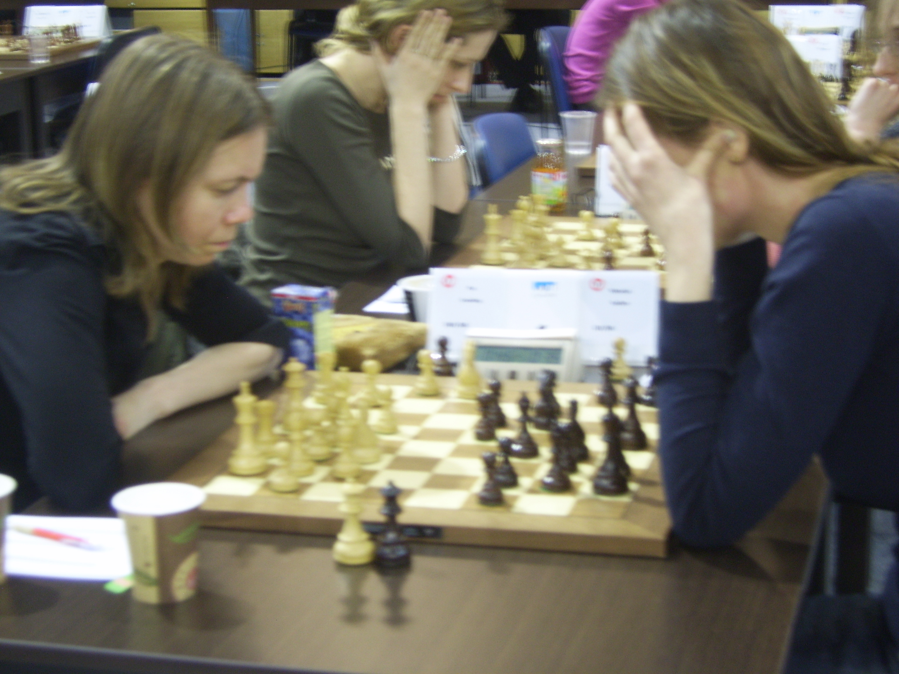 Cramling Pia (lijevo) protiv Cmilyte Viktorija (desno) na 11. Europskom pojedinačnom prvenstvu u šahu za muškarce i žene 2010. g. u Rijeci